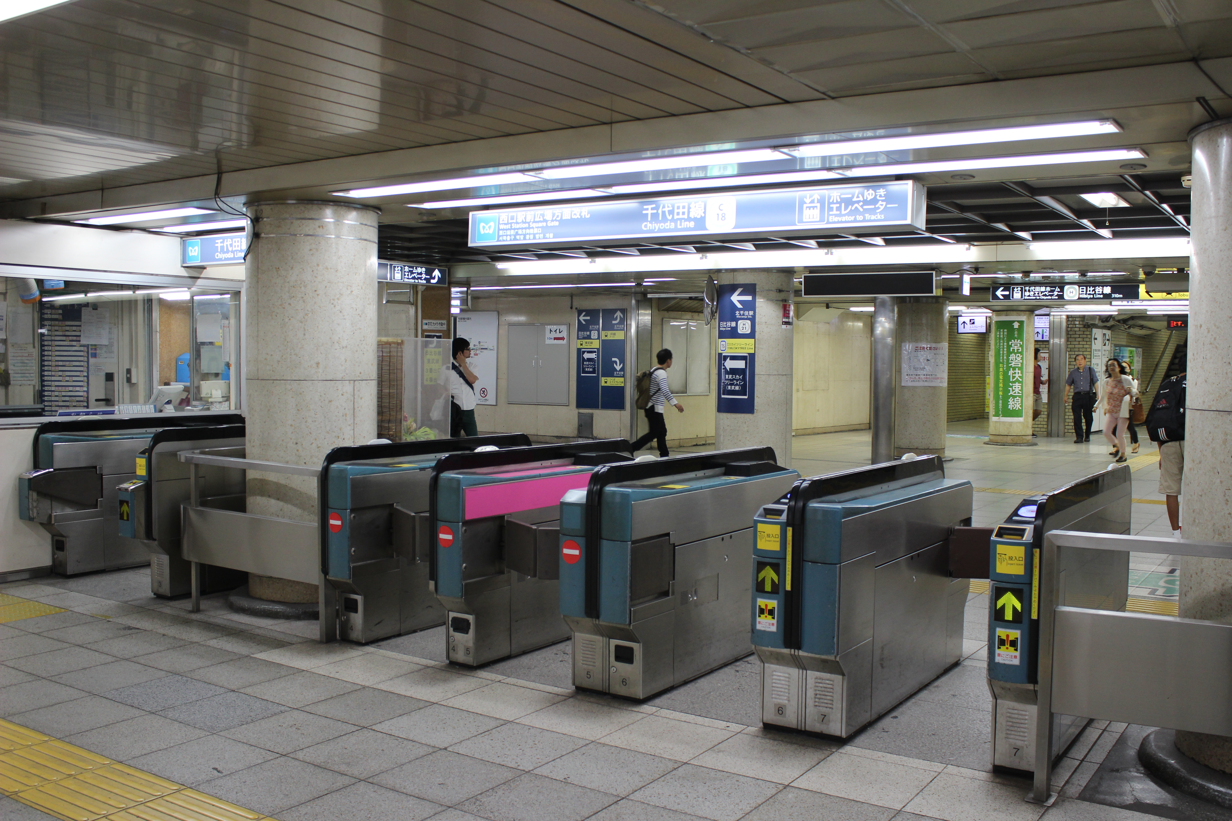 東京メトロ千代田線西口駅前広場改札口